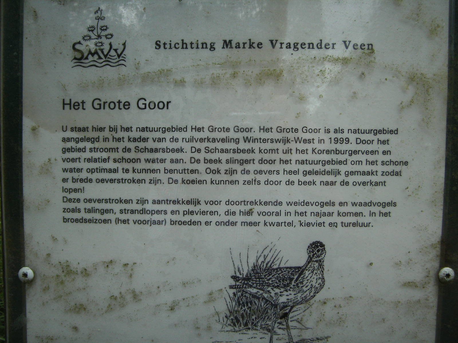 Informatiebord uitkijkpunt Grote Goor